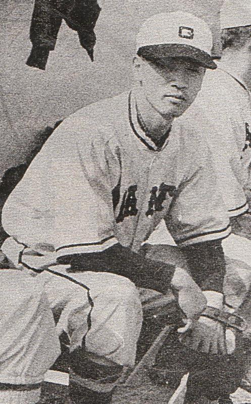 日本のプロ野球選手、三原修（三原脩）（1936年当時）。